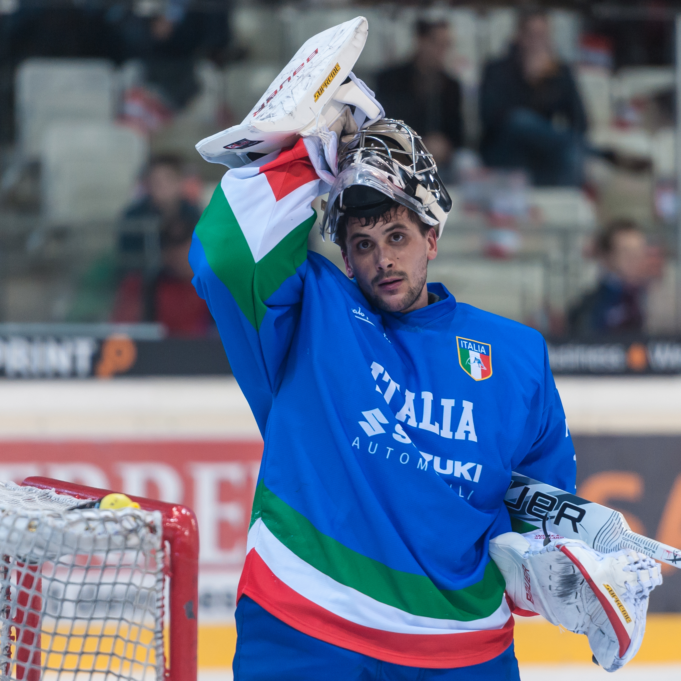 Freundschaftliches Eishockey-Länderspiel - Österreich vs Italien. Bild zeigt Andreas Bernard (ITA).